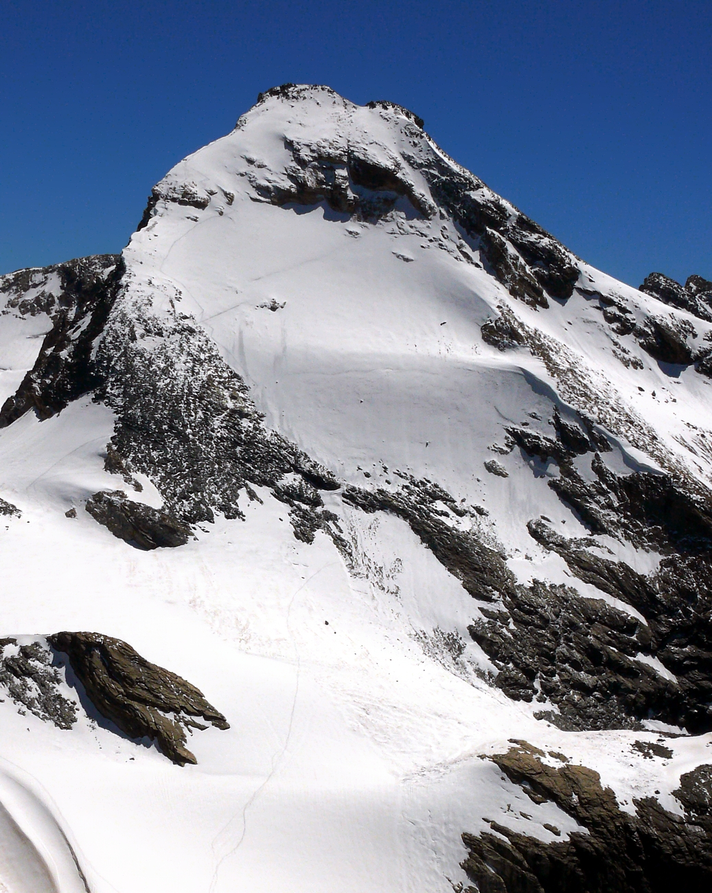 Tsanteleina - Alpi Graie - Italy